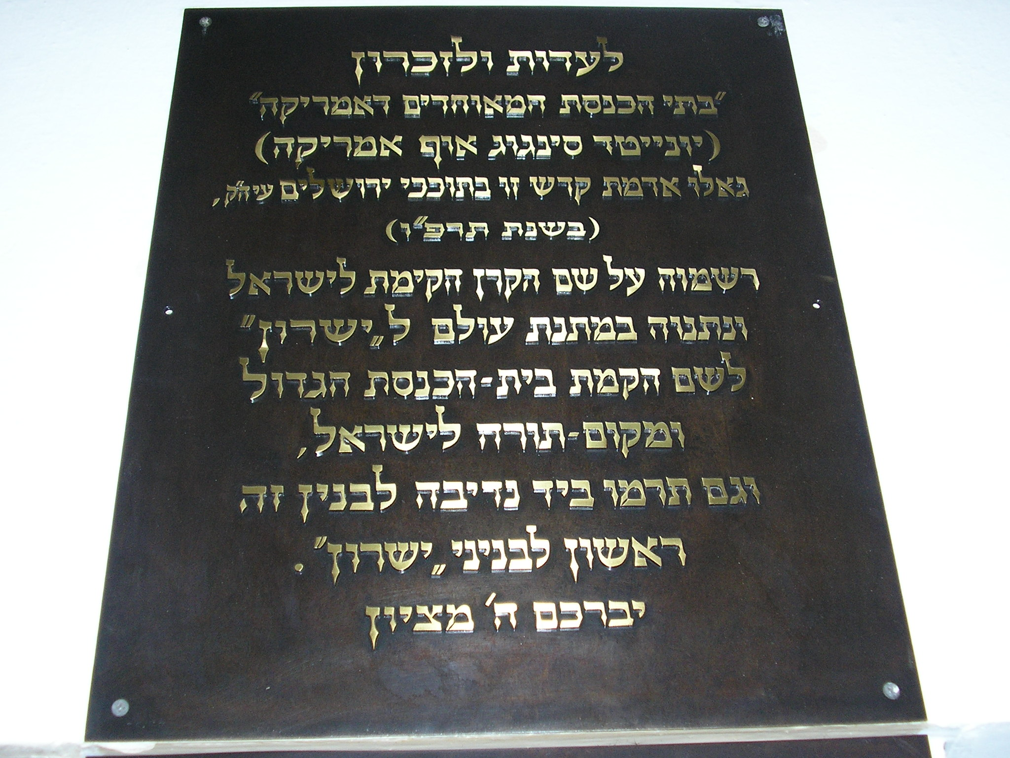 לוחית המתכת בכניסה לבית הכנסת "ישורון" בירושלים.